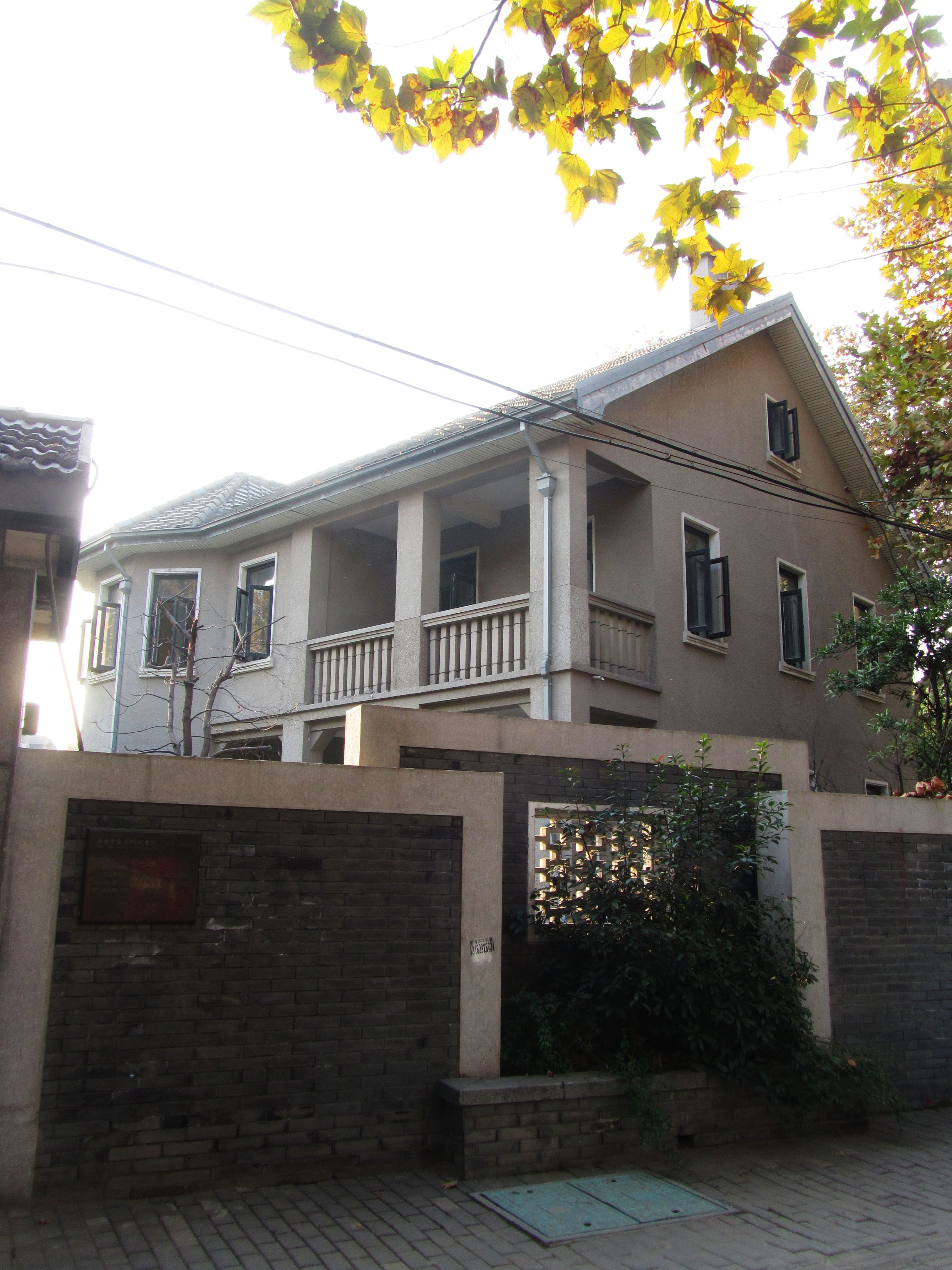 颐和路公馆区——江苏路23号薛岳公馆旧址。